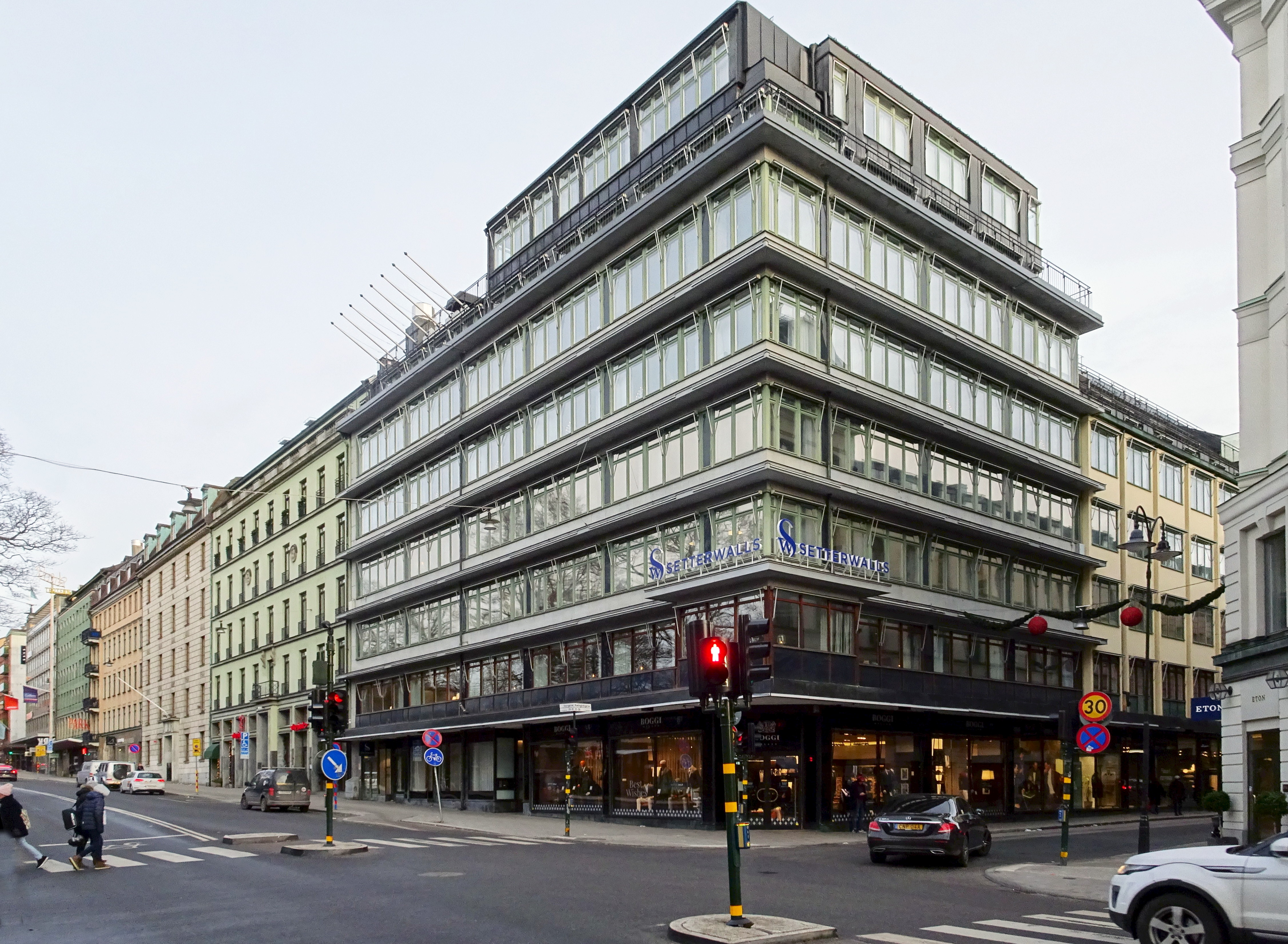 Fastigheten Humlegården 57, Sturegatan 10-12. Nybyggnadsår 1928 - 1930. Björn Hedvall (Arkitekt). G. Kjellberg (Byggherre). Gumpel & Bengtsson (Byggmästare)